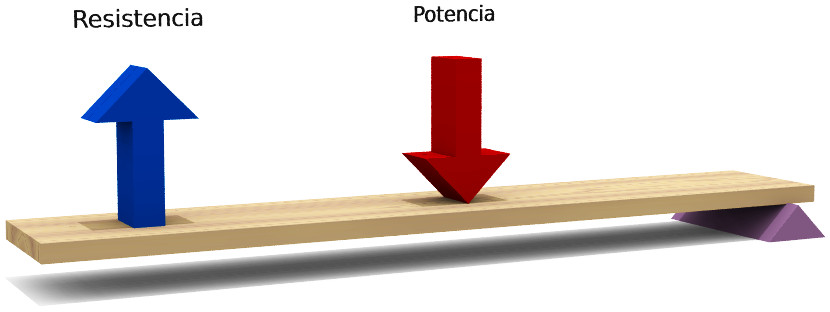 Ilustración que muestra a una palanca de tipo 3. Copyright © 2004 César Rincón. Imagen creada para la Wikipedia en Español.